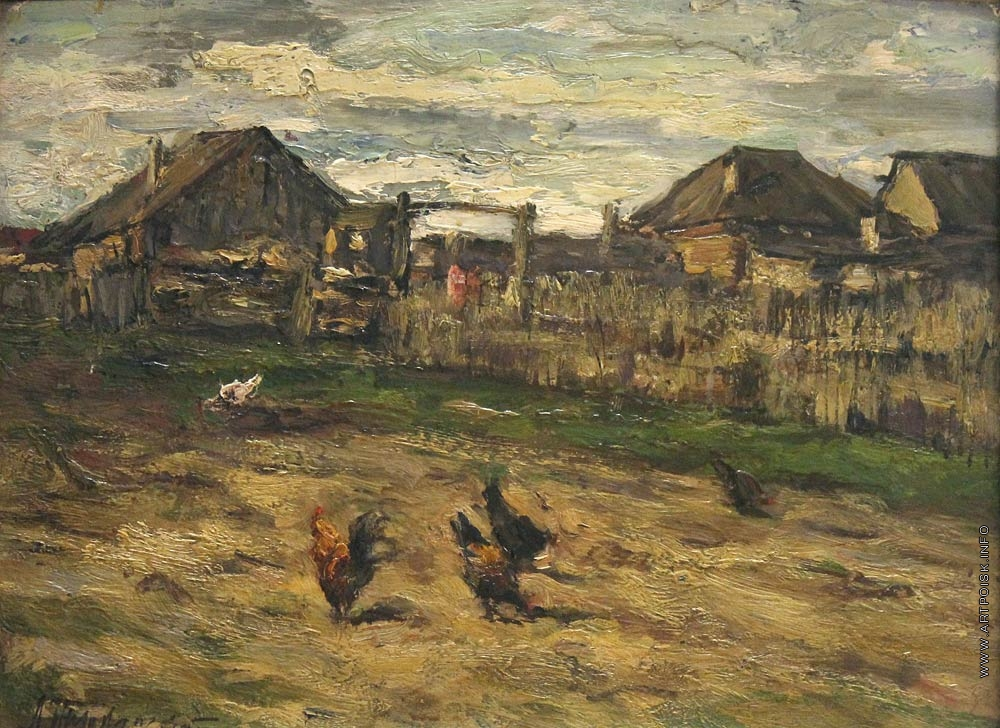 В деревне Год создания 1910-е Материал Холст, картон, масло Собрание Национальный художественный музей Республики Беларусь